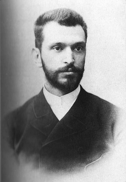 фотографија. око 1885. Марко Цар, књижевник (1859-1953). T. Burato, Zara